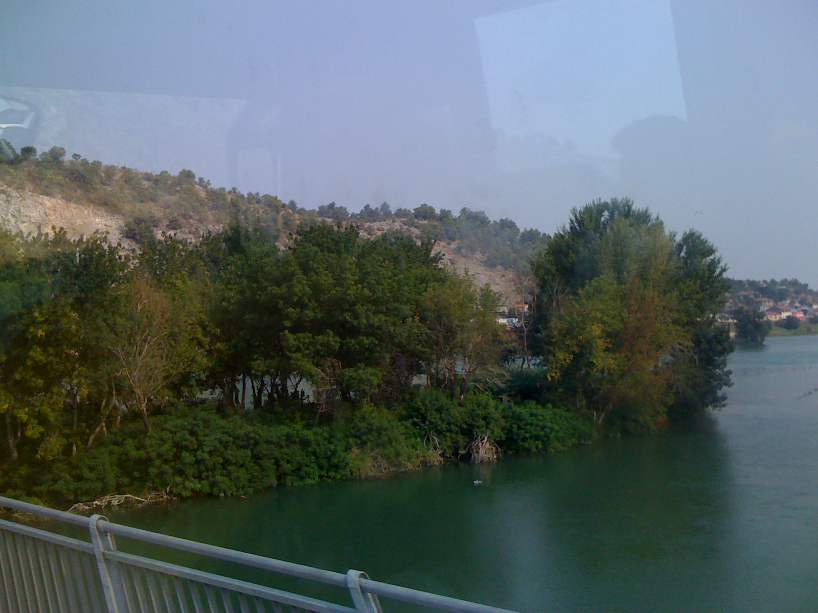 Lumi Buna-Veiipoje, Shkoder